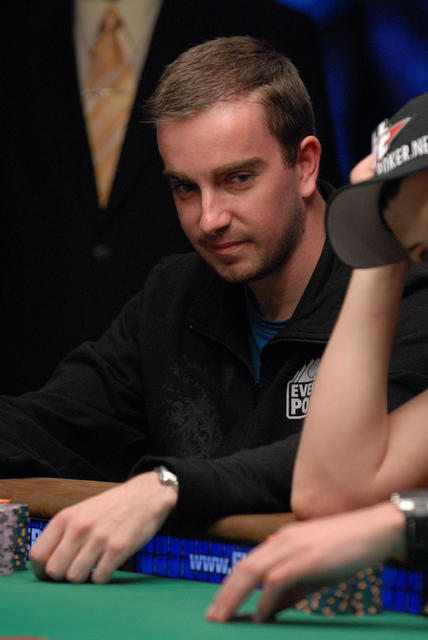 Antoine Saout aux WSOP Main Event 2009